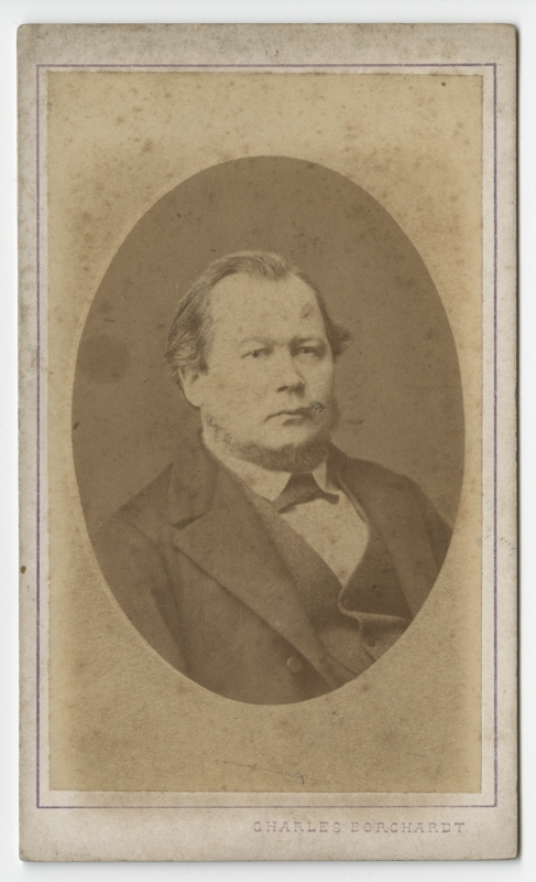 Portree: Woldemar Kentmann, praost, Kuusalu pastor